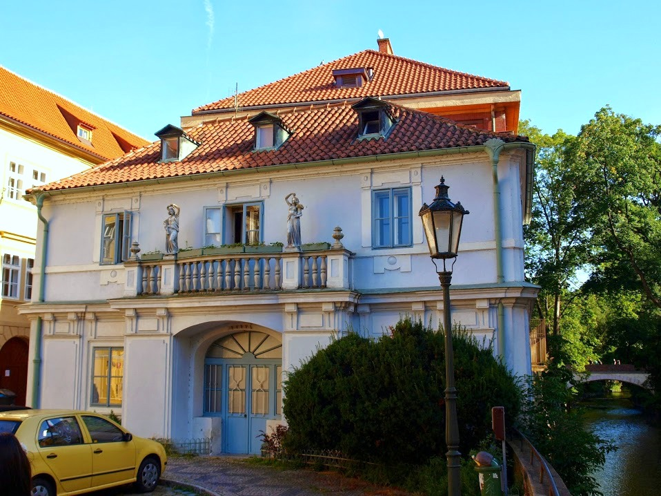 Humlův dům na Malé Straně v Praze